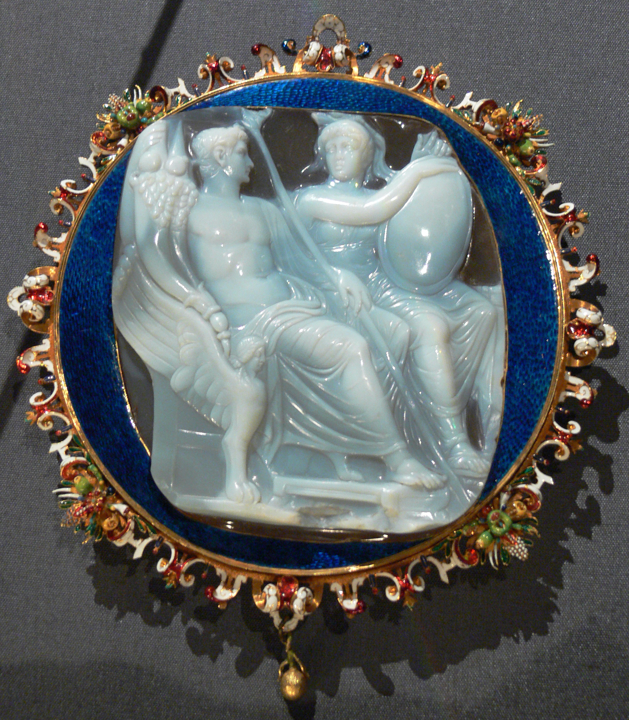 Kameo: Kaiser Caligula und Roma. Römisch, Frühe Kaiserzeit. 37 - 41 n. Chr. Sardonyx, zweischichtig. Fassung: Gold, emailliert, 17. Jh. H. 11 cm. Kunsthistorisches Museum Wien, Antikensammlung. Inv.-Nr. IXa 59. Fundort: Unbekannt. Provenienz: Schatzkammer; seit 1724 im kaiserlichem Besitz nachweisbar; 1779 Übernahme.